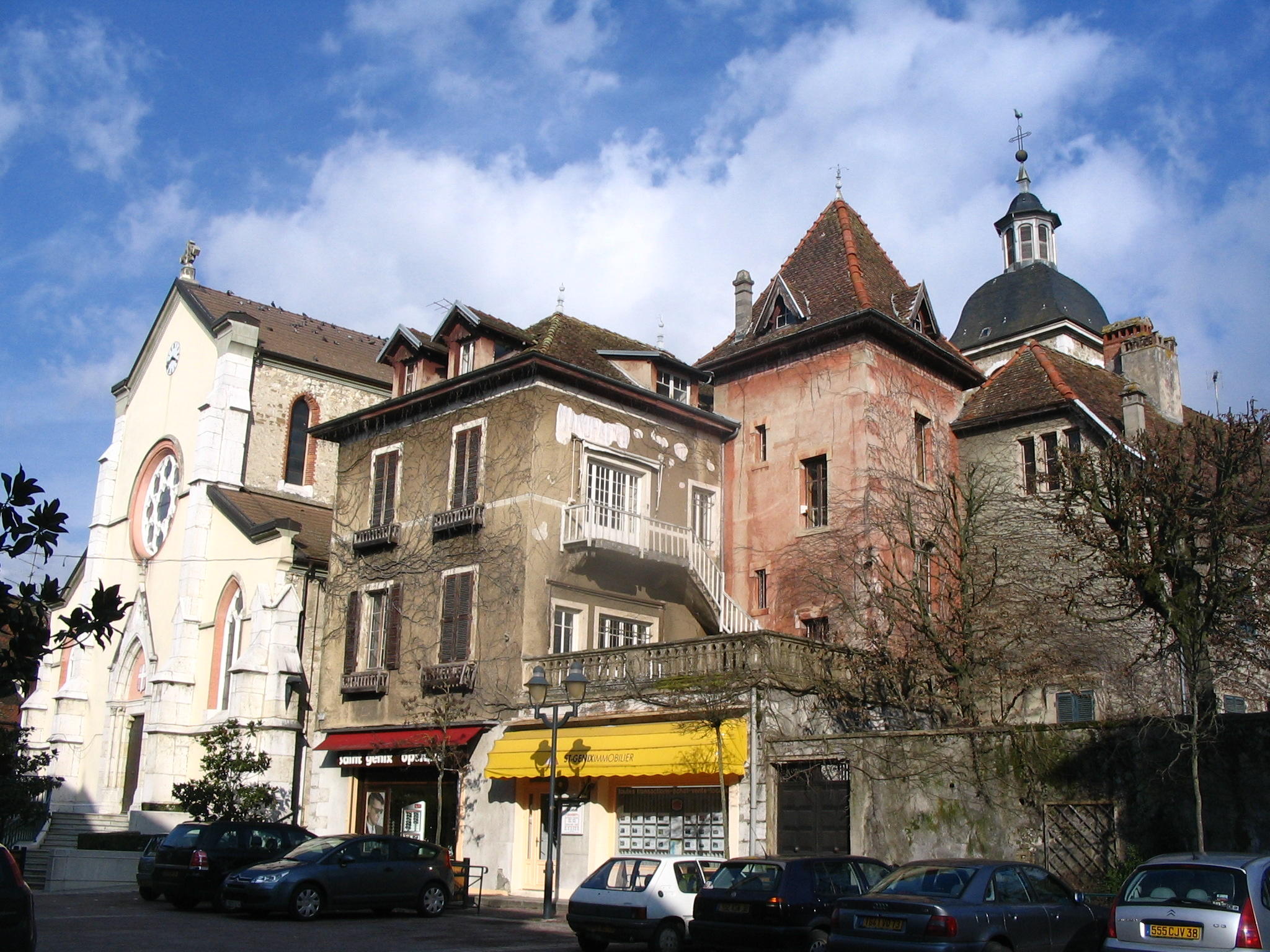 Saint-Genix-sur-Guiers - Place de l'Eglise